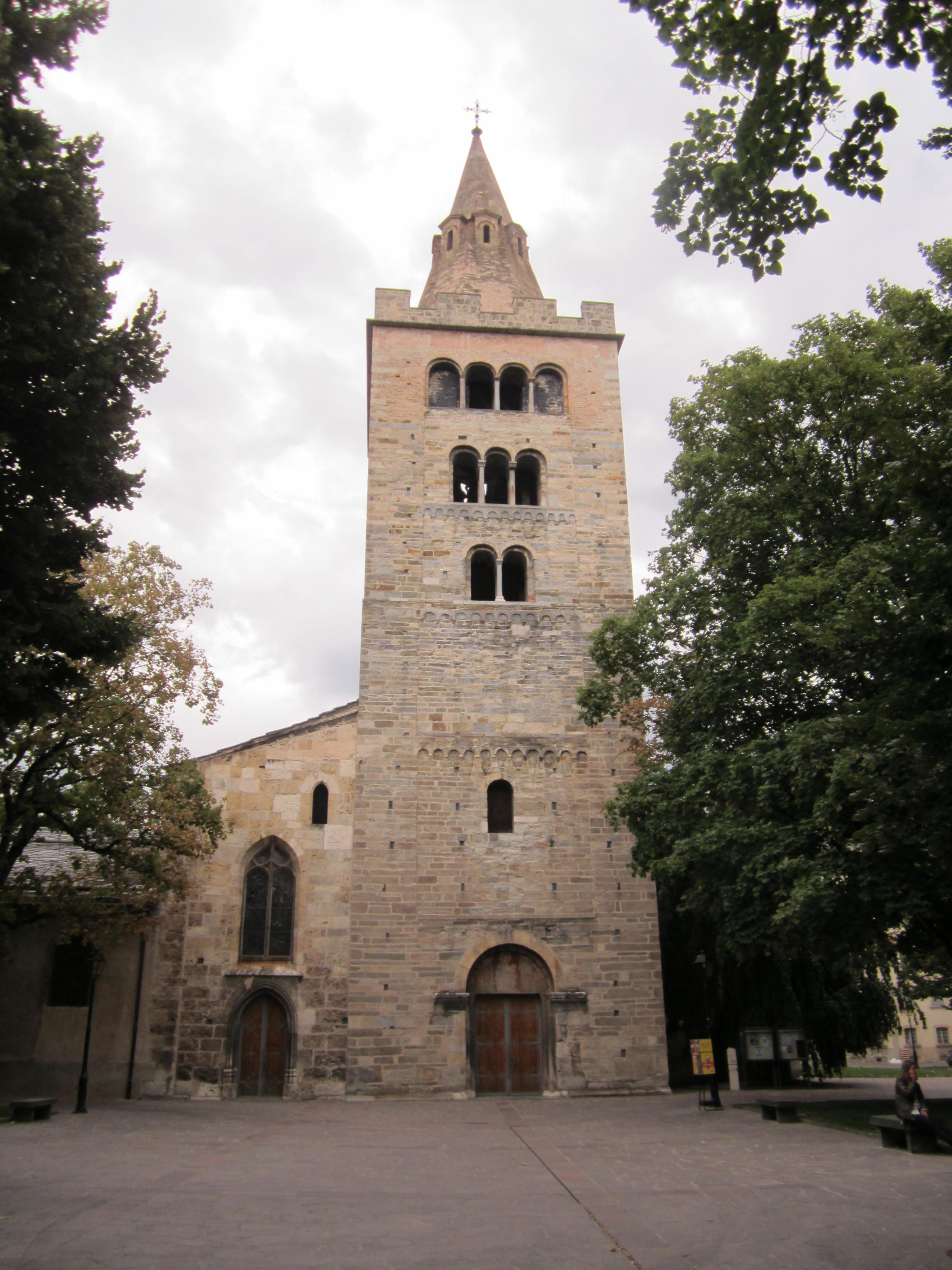 Duomo di Sion (Svizzera)